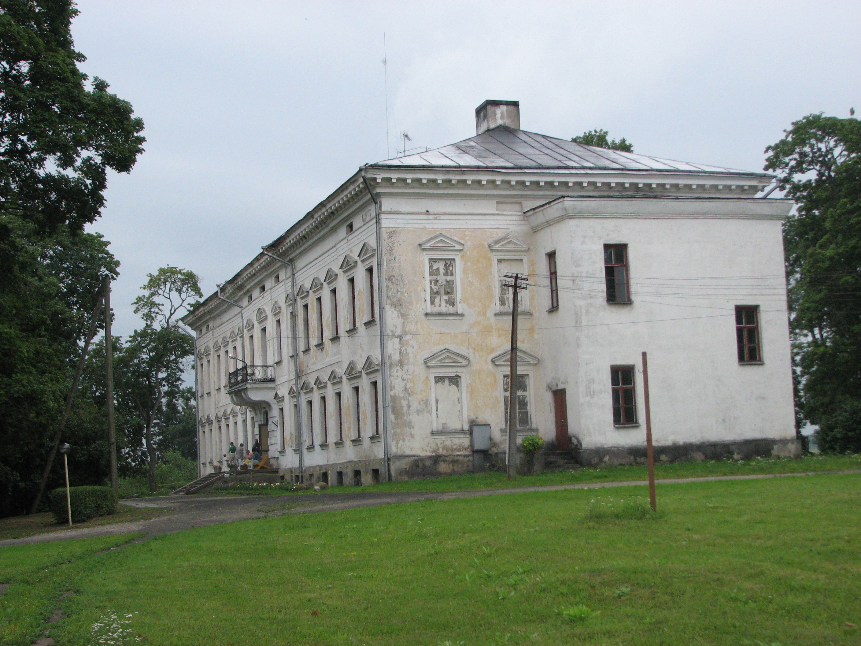 Udriku manor, Estonia